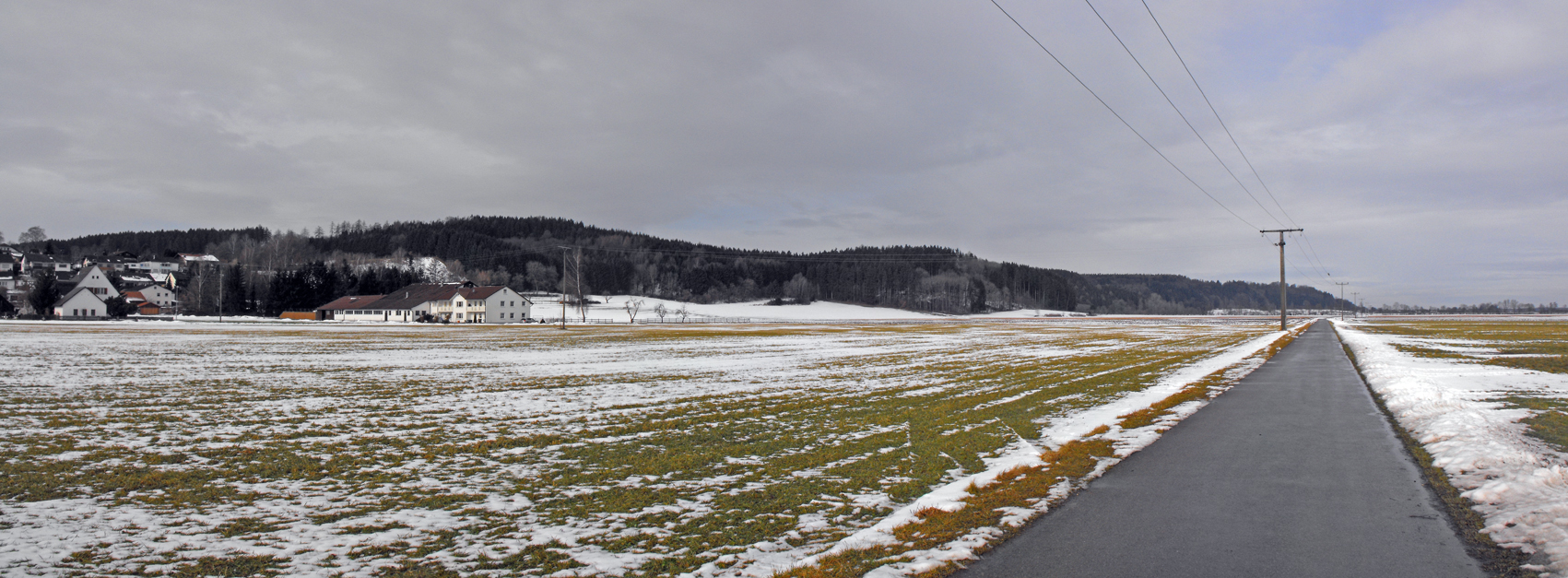 Die Holzstöcke vom Illertal (bei Kirchberg) aus betrachtet